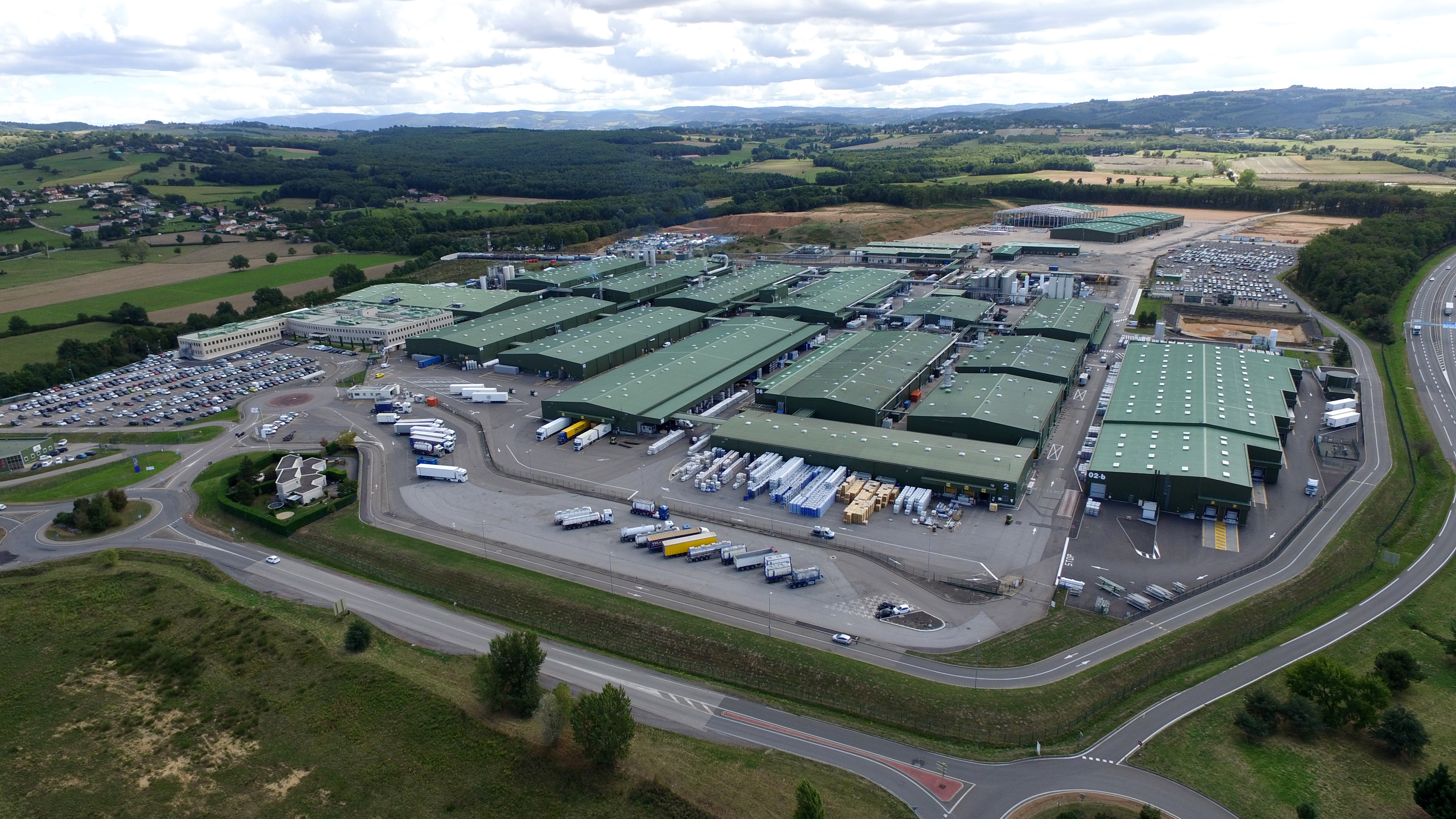 Photo aérienne 2017 de l'usine et siège social de SNF à Andrézieux, France